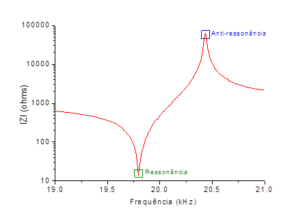 Gráfico de impedância de um Analisador de Transdutores digital equipado com uma interface para computador.UnknownUnknown impedance plot of a digital horn analyzer with computer interface.